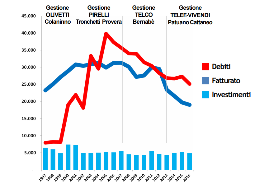 Ricostruzione dei principali dati di bilancio dopo 20 anni di privatizzazione. Tutti i dati sono stati reperiti dai Bilanci annuali del Gruppo Telecom. La slide è stata presentata presso le aule del Senato e della Camera dei deputati ed è presente nel libro "Goodbye Telecom" presentato presso le aule del Senato dal Movimento Cinque Stelle